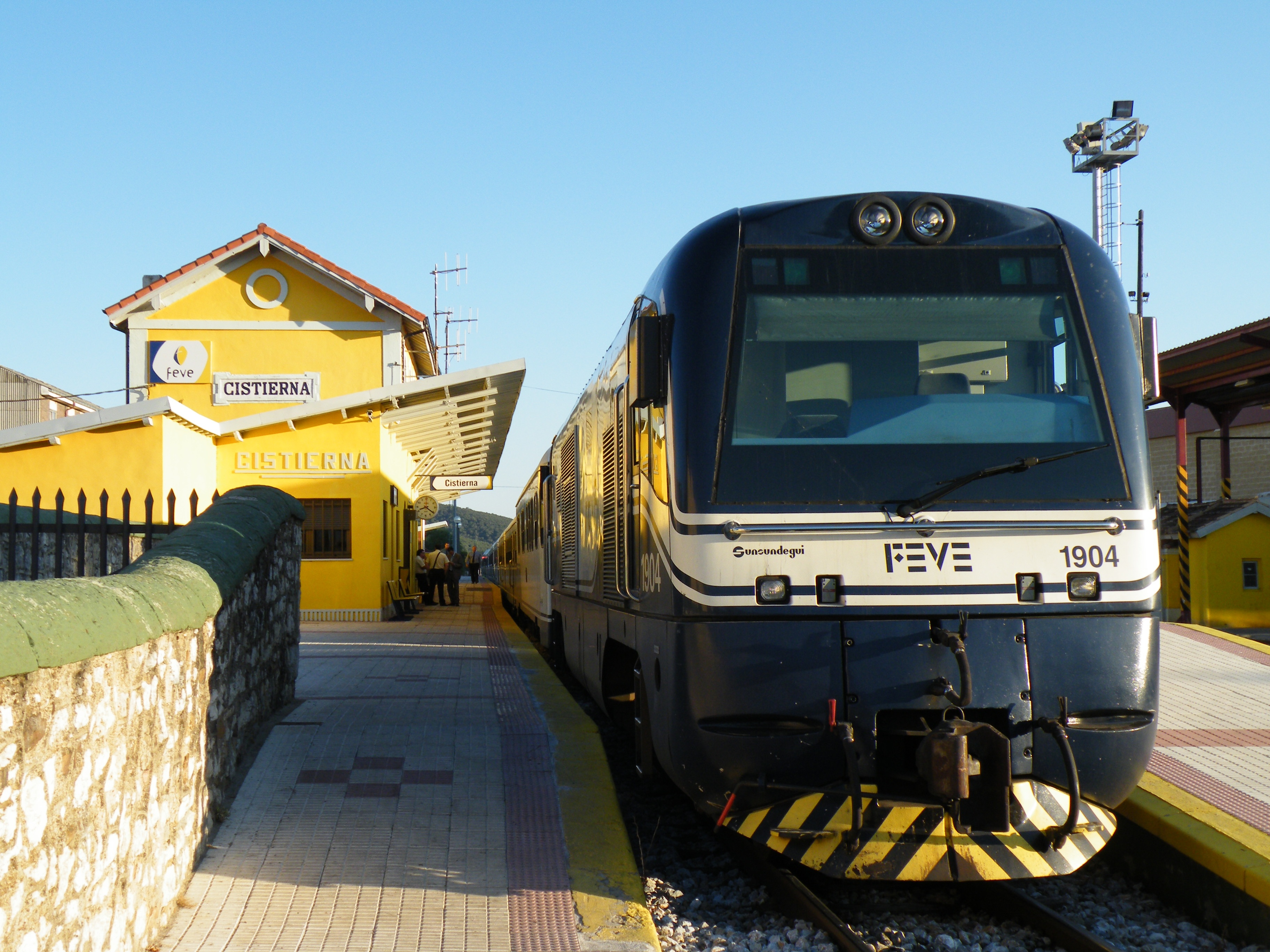 Locomotora de la serie 1900 de Feve en Cistierna (León) con un tren Transcantábrico.